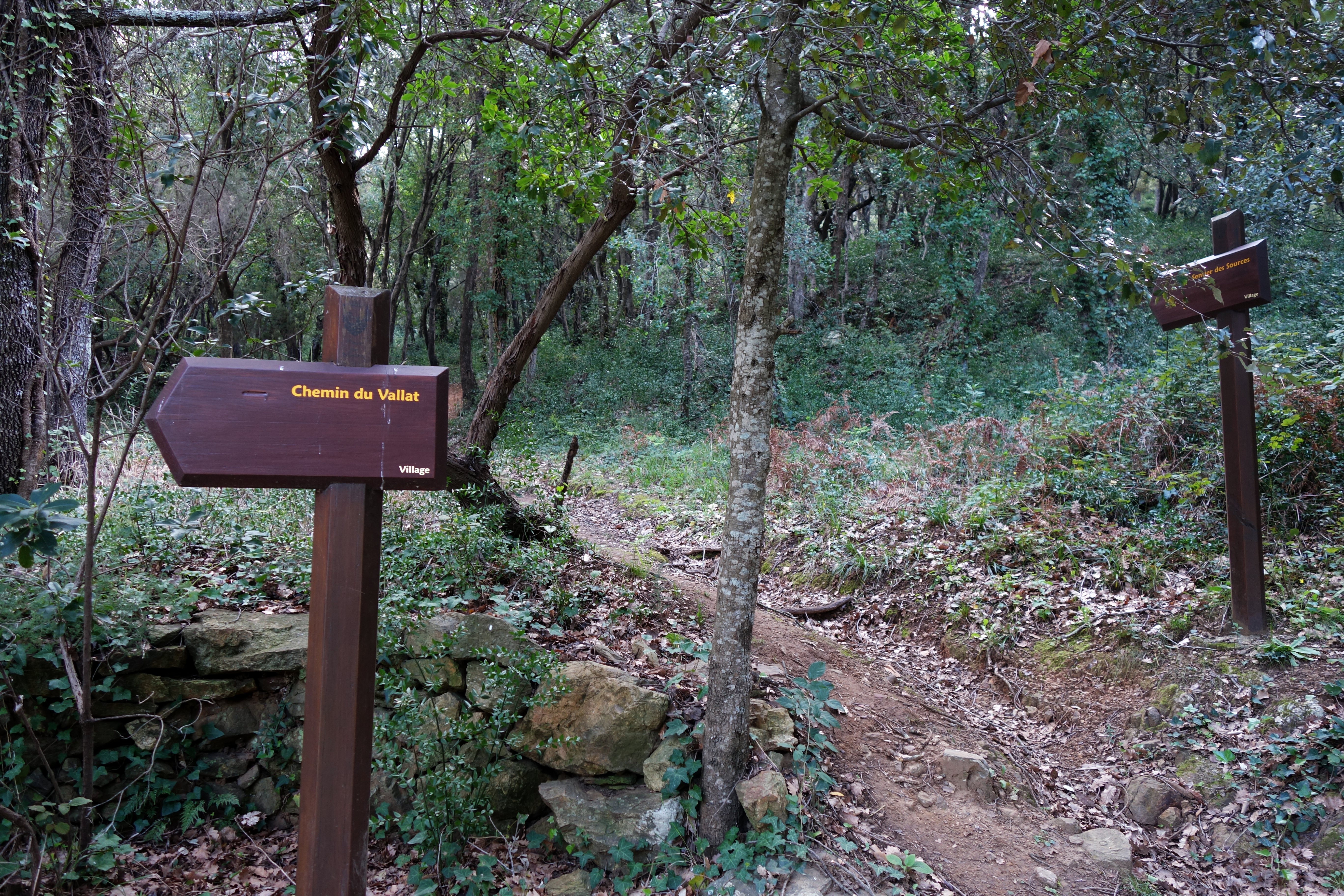 Panneaux indiquant le sentier des Sources et le sentier du Vallat sur les boucles de l’Arlatane à Gassin